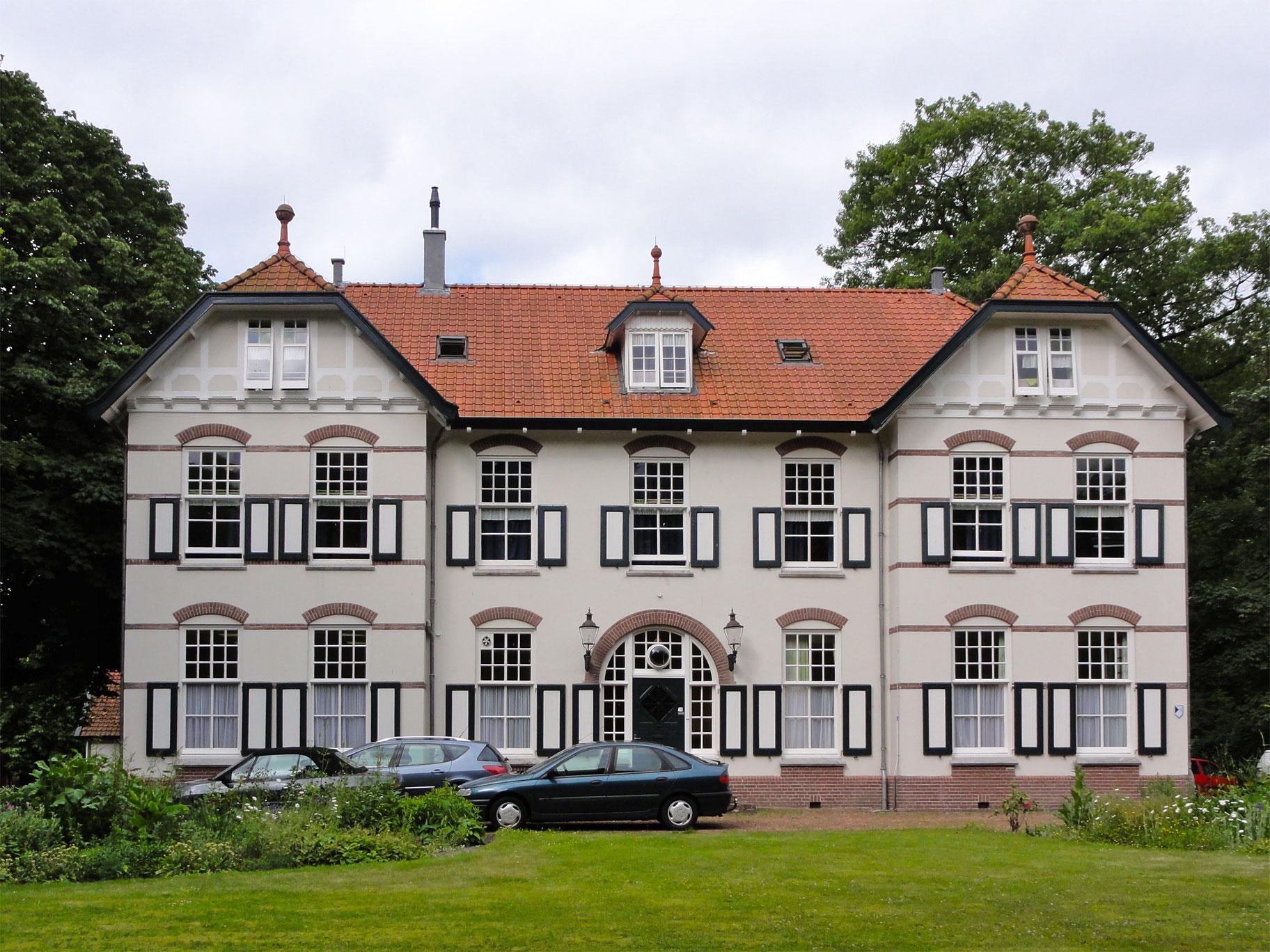 Rustoord II van de Maatschappij van Weldadigheid - Koningin Wilhelminalaan 24 Wilhelminaoord - rijksmonument